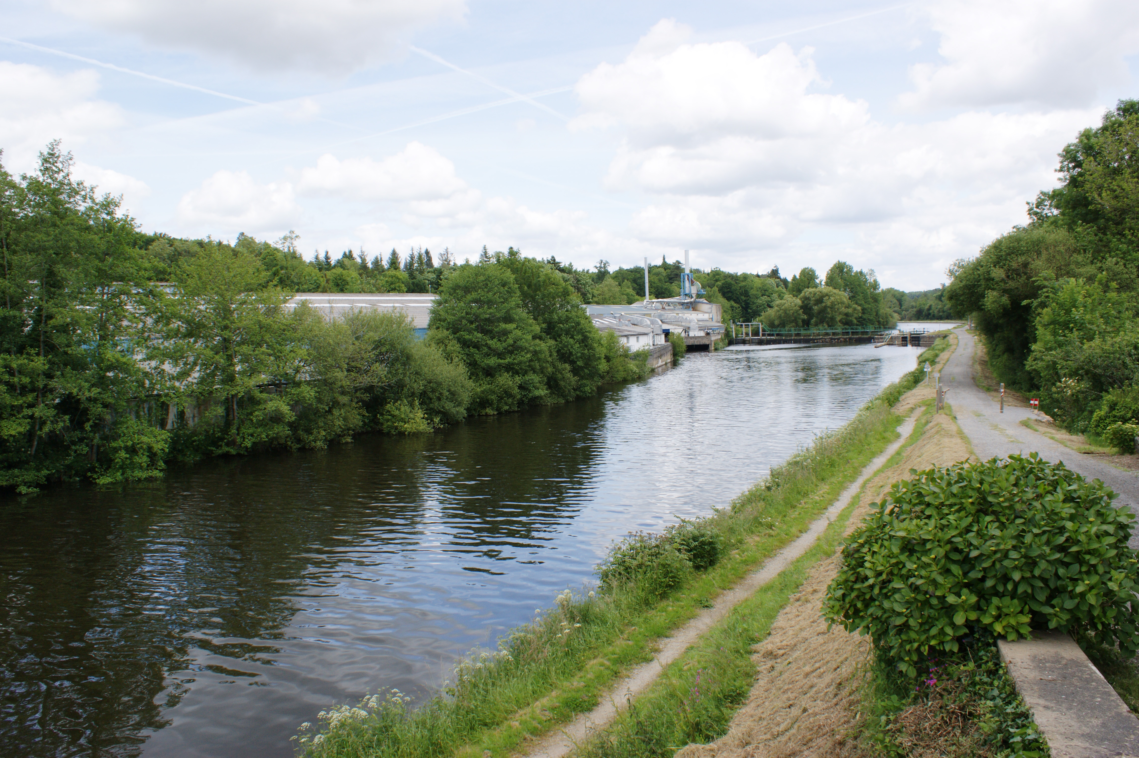 Usine, sur la commune de Melrand près de Saint-Rivalain Gare.